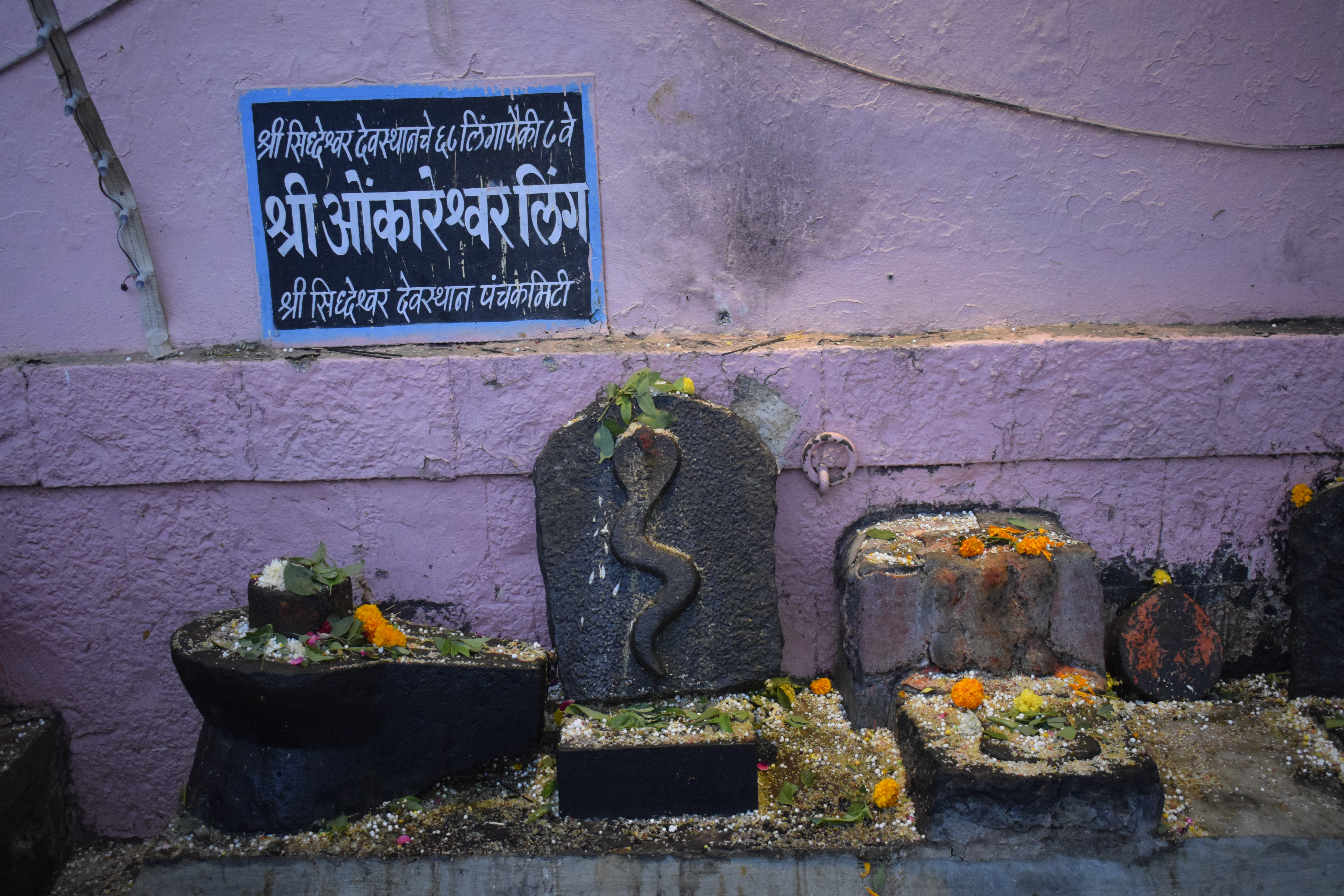 श्री ओंकारेश्वर लिंग